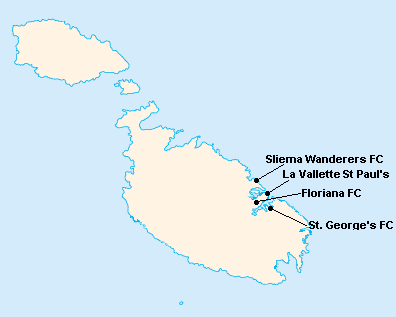 Répartition des clubs en First Division Maltaise 1937-1938.